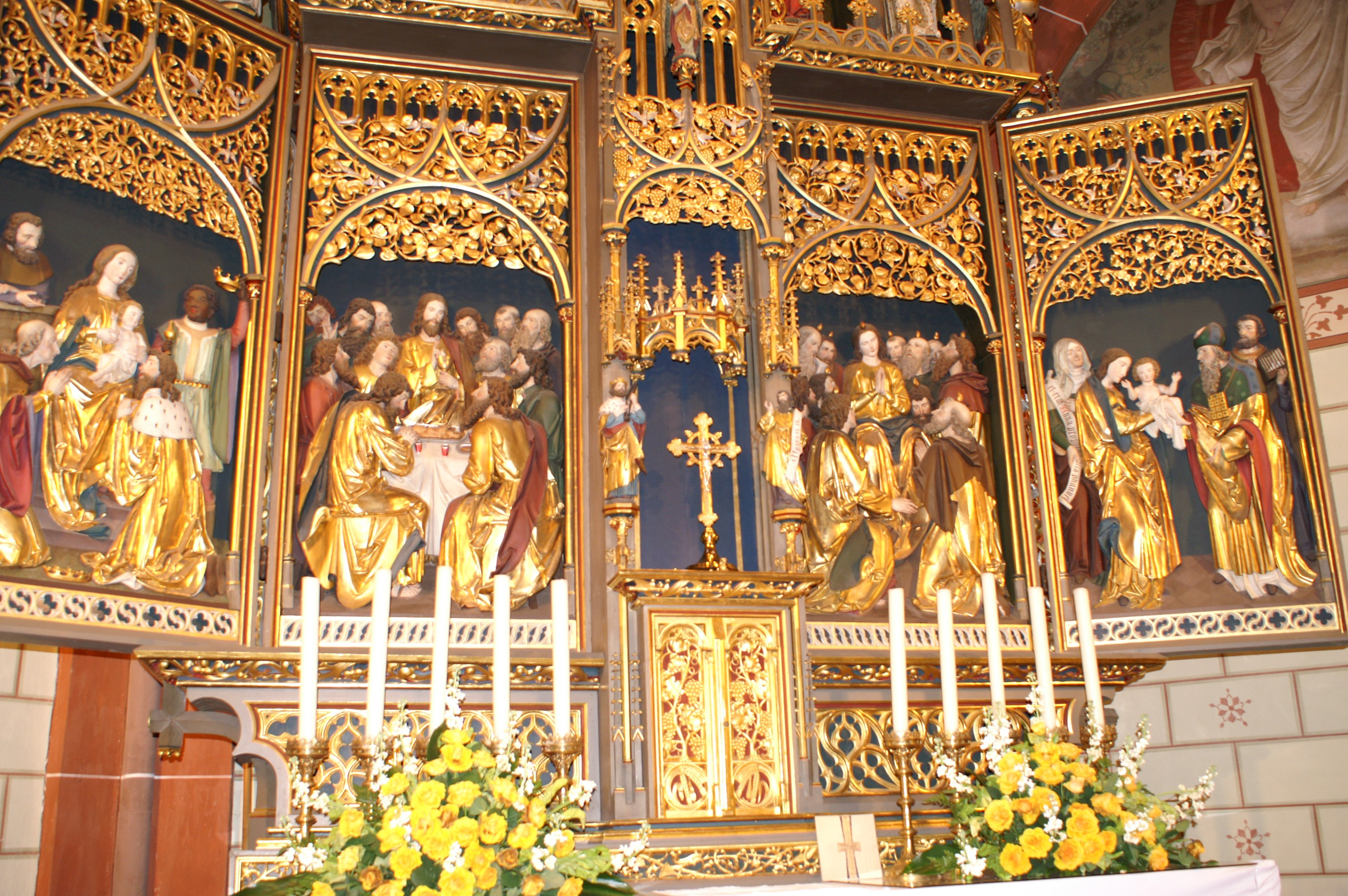 Ausschnitt des Hochaltares der Pfarrkirche St. Philippus u. Jakobus, Speicher